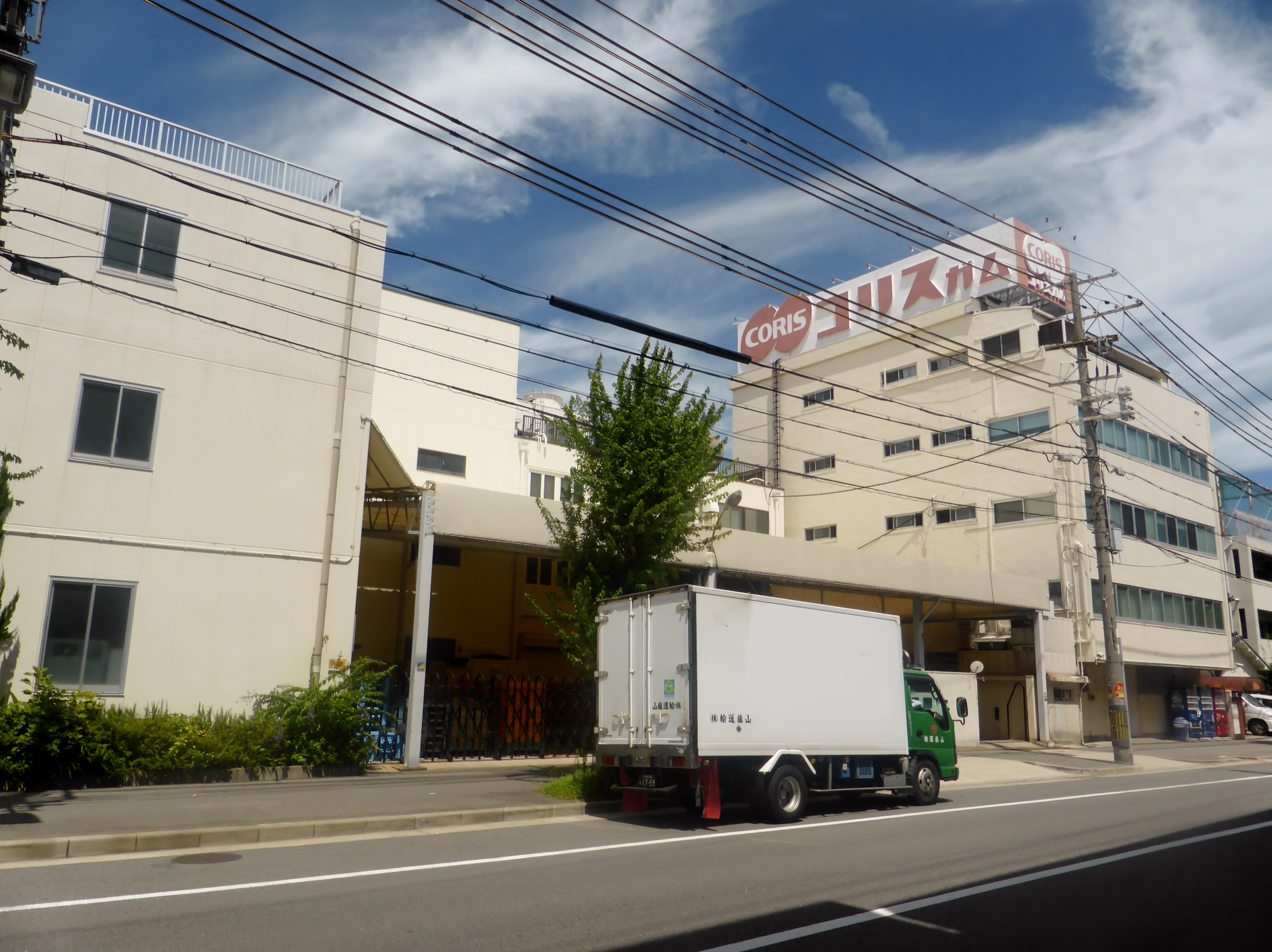 コリスの本社を撮影